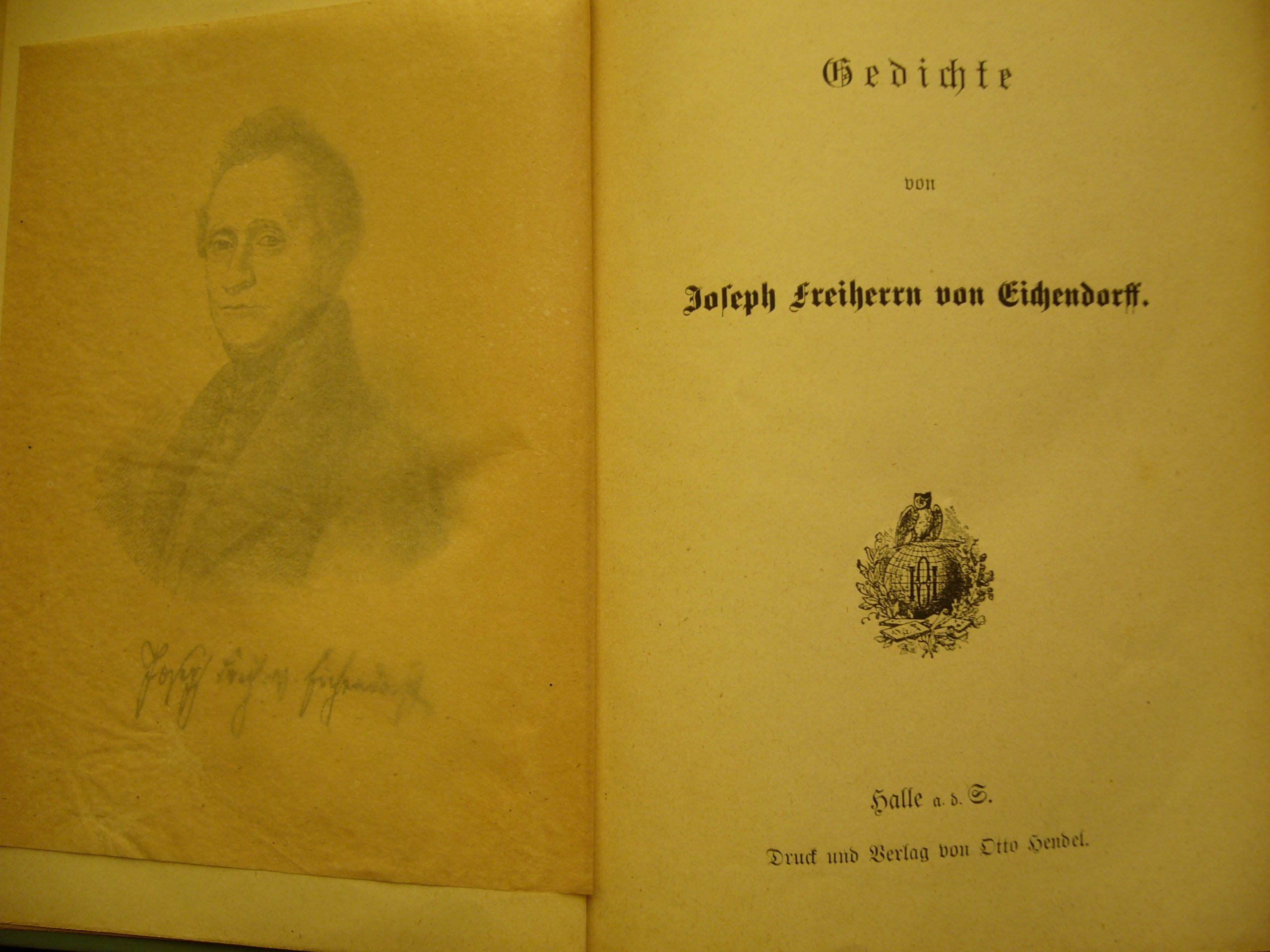 Gedichte, Titelblatt der Ausgabe des Otto-Hendel-Verlags, Halle, o.J.